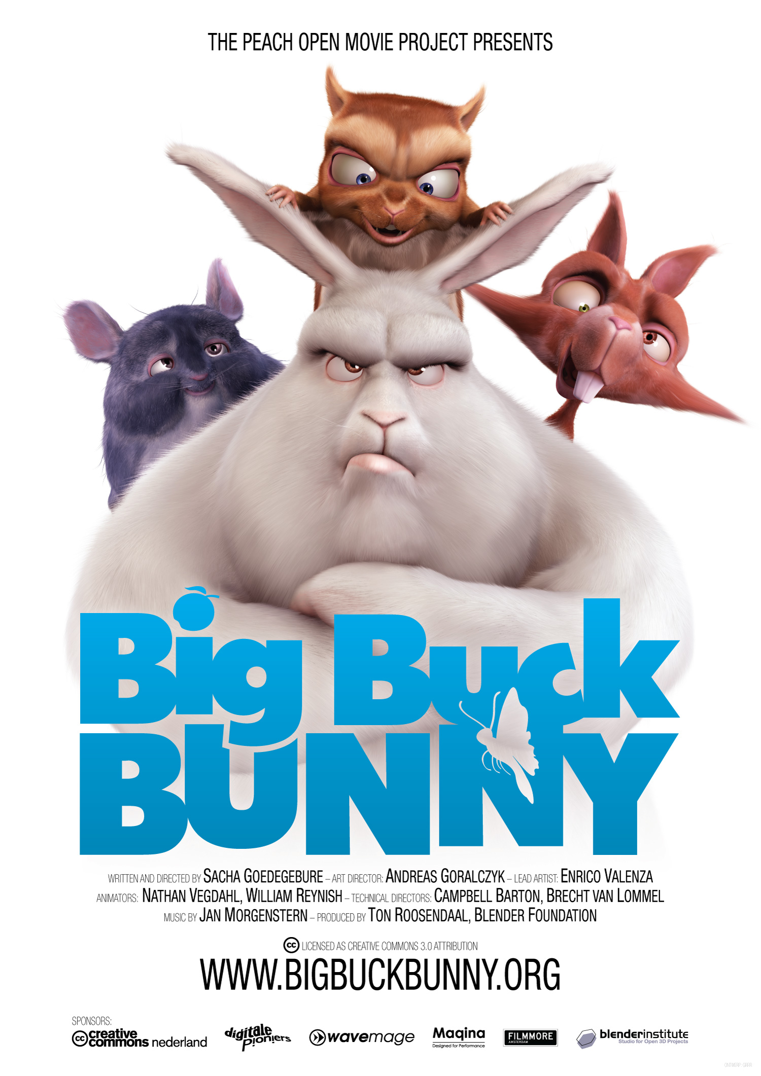 Big Buck Bunny poster